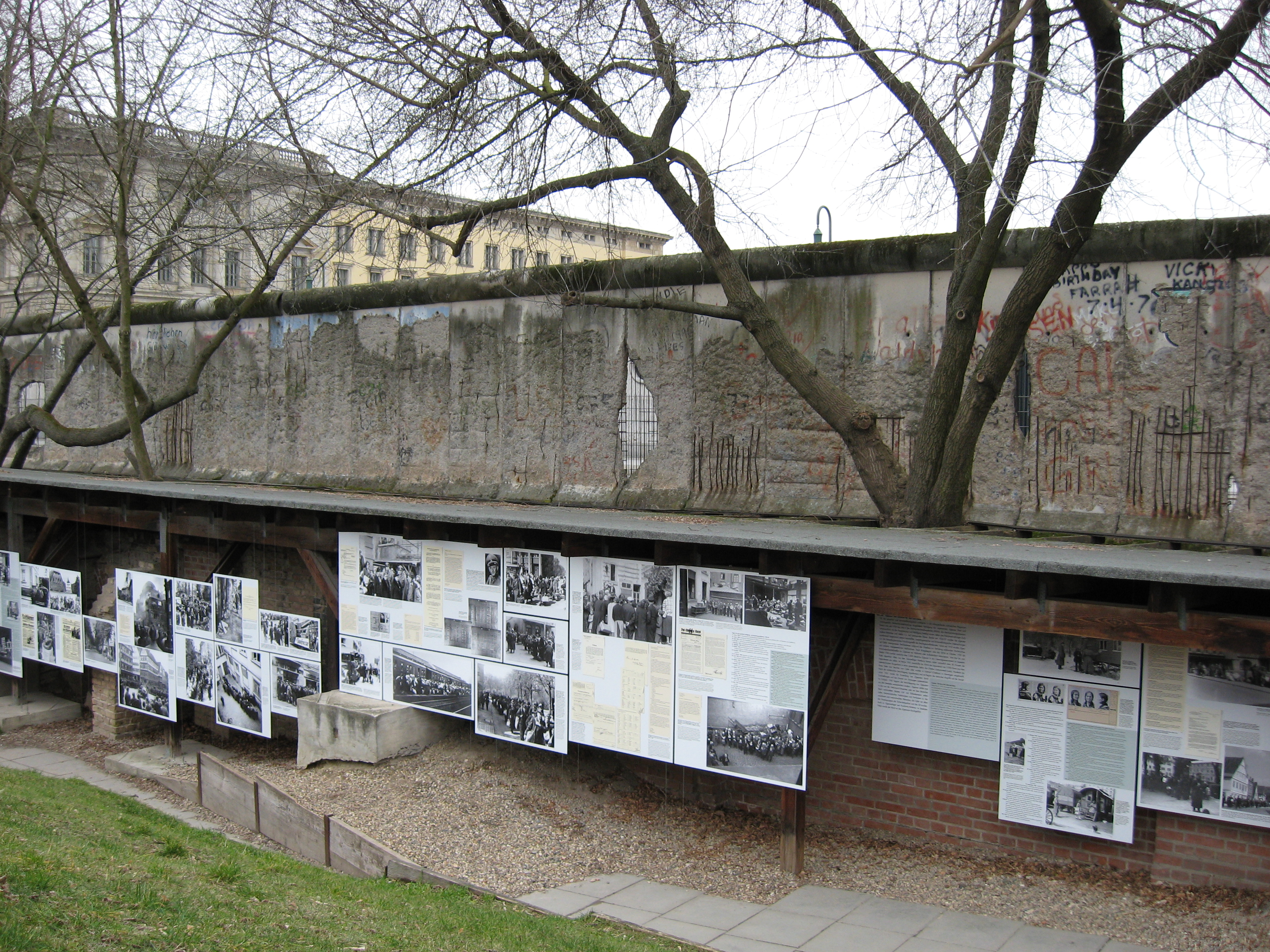 Bild der Ausstellung "Topographie des Terrors" in Berlin